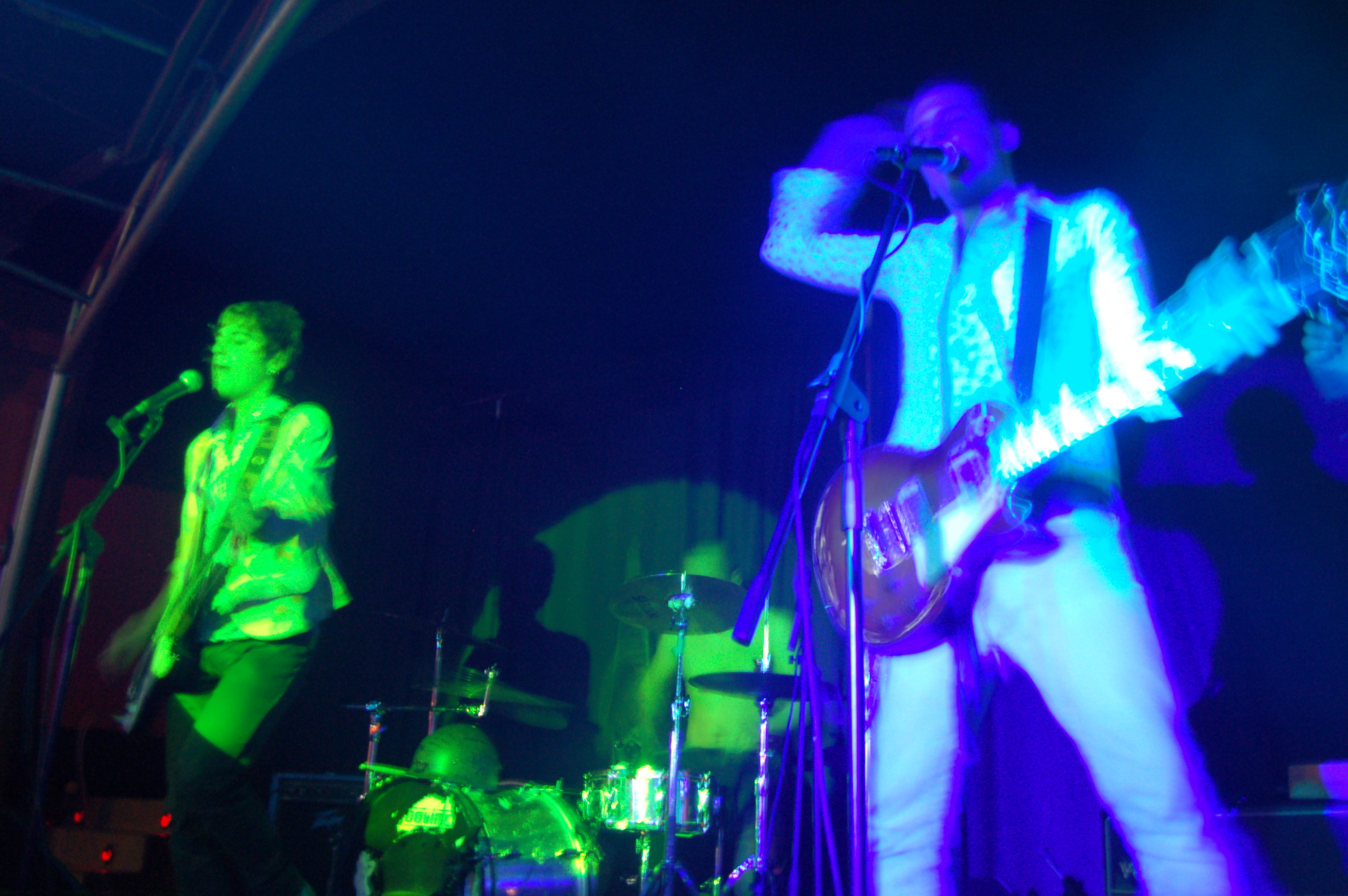 Novedades Carminha en concerto na sala Karma de Pontevedra